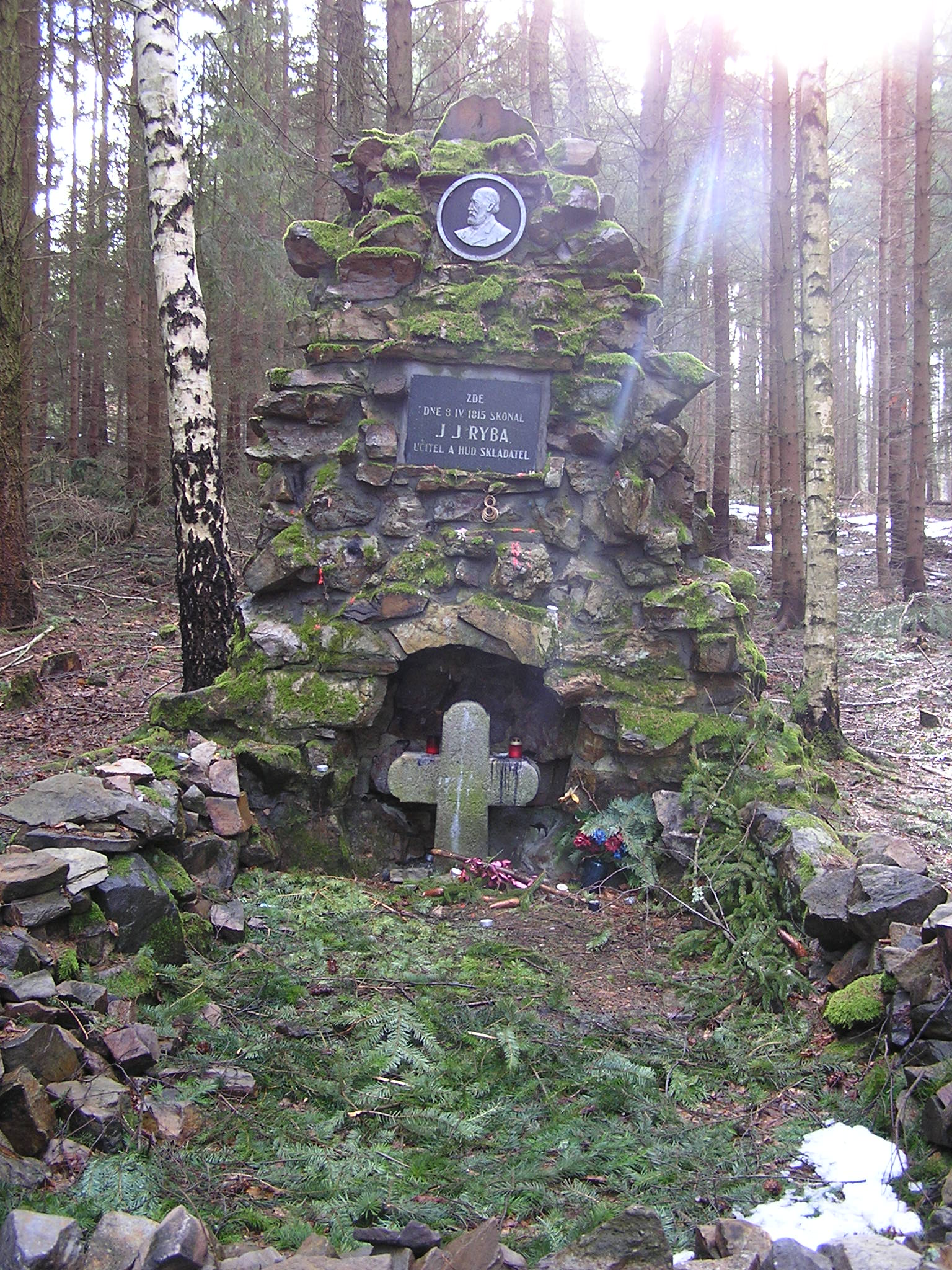 Pomník Jakuba Jana Ryby u Voltuše